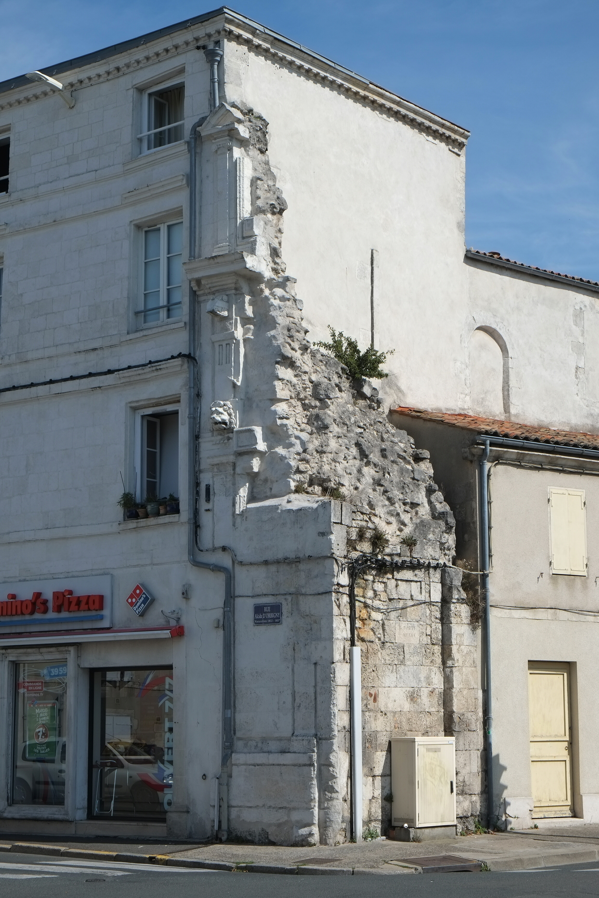 Vestiges de la porte de Cougnes La Rochelle Charente-Maritime France